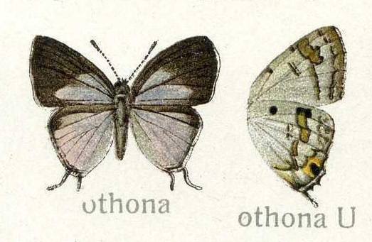 Chliaria othana, Lycaenidae